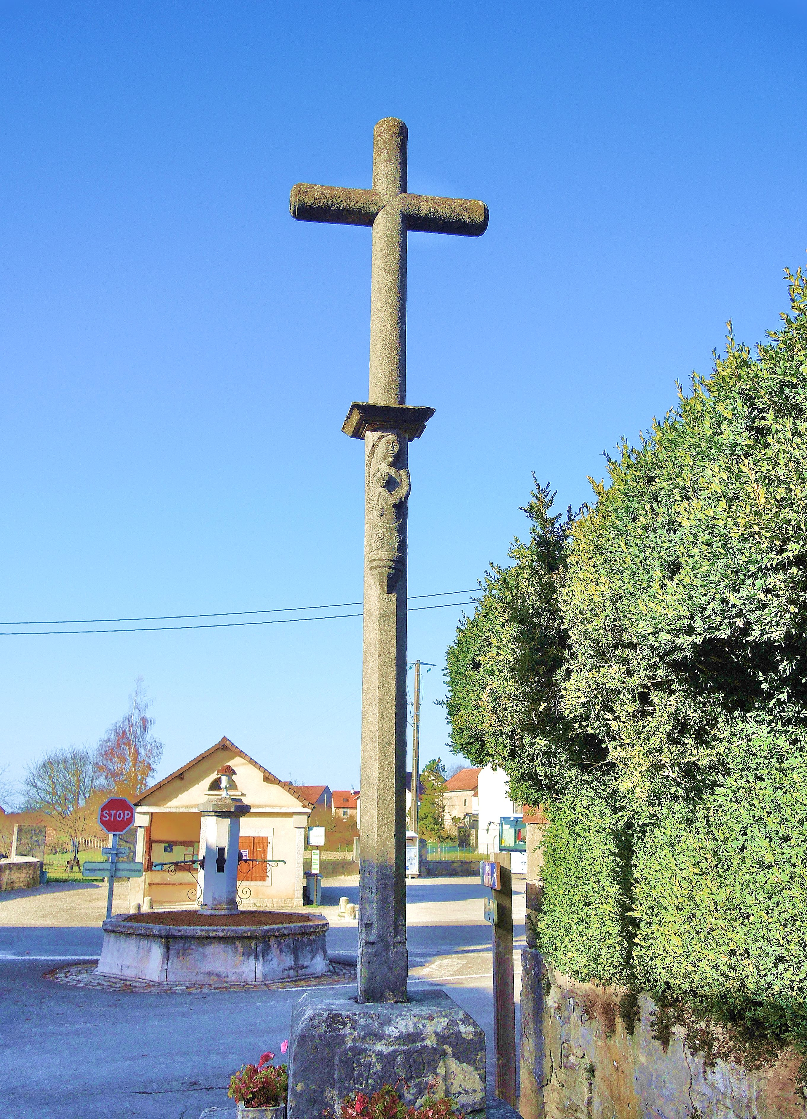 Croix avec statuette de la Vierge à l'Enfant. Village de La Marre. Département du Jura. France.